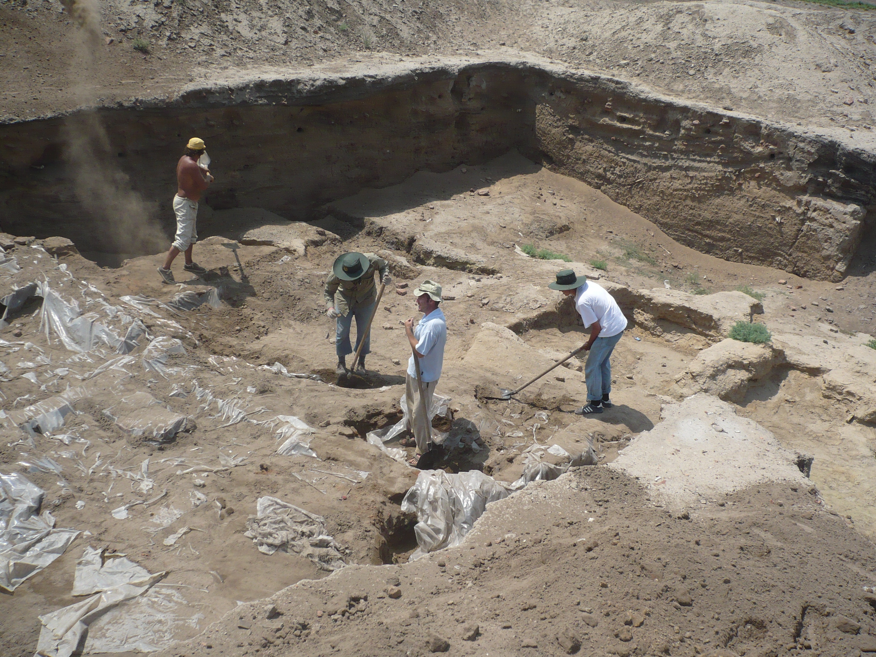 Самосдельское городище, 2008 год